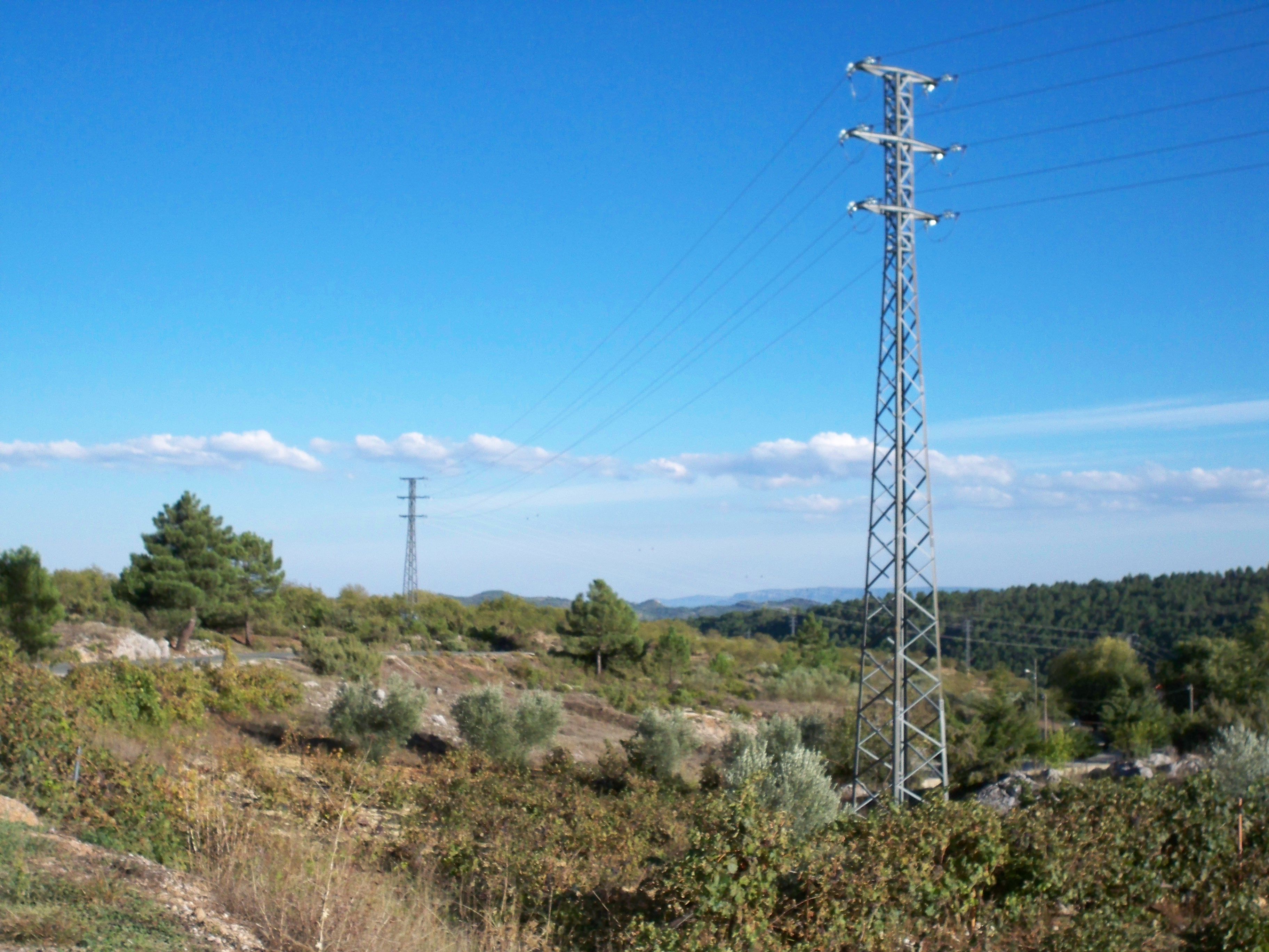 Línea eléctrica cercana a la localidad de El Pardal (Molinicos - Albacete)